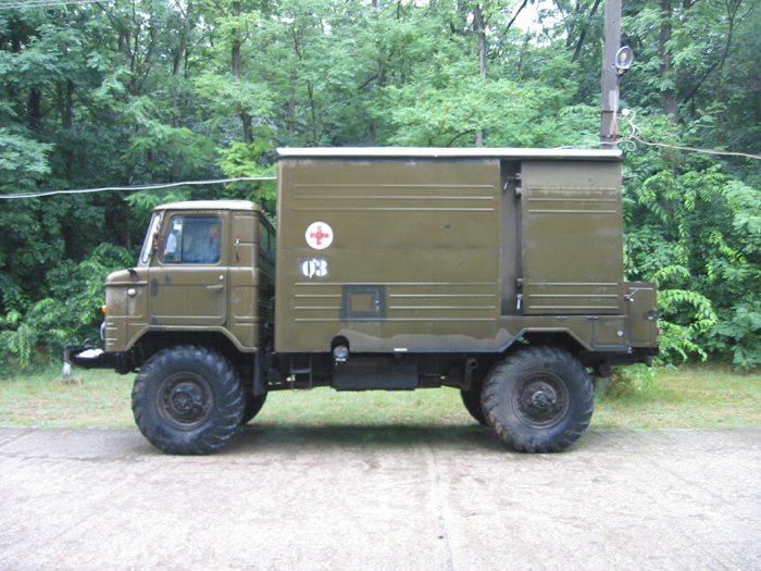 GAZ-66 Vegyvédelmi (ДДА-66, дезинфекционно-душевой автомобиль)